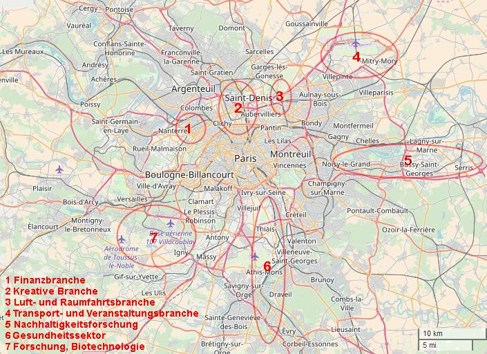 Cluster in Grand Paris